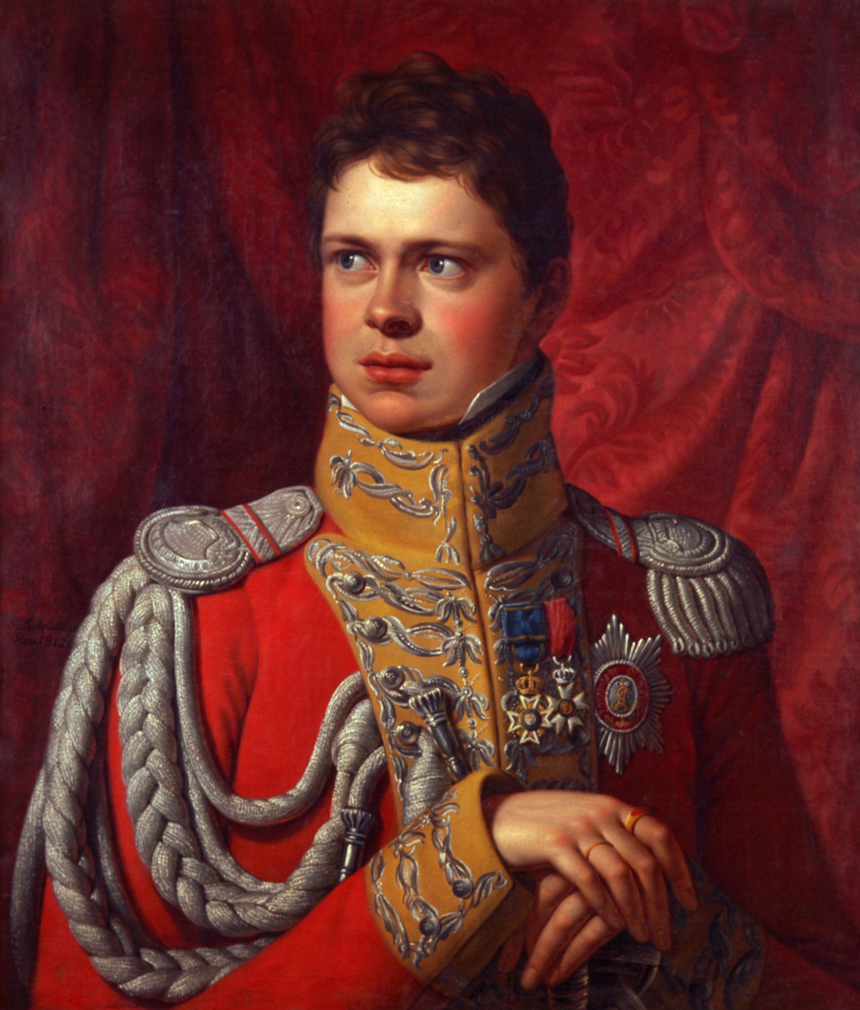 Rudolf Friedrich Carl Suhrlandt (1781-1862): Carl Bernhard Prinz von Sachsen-Weimar-Eisenach (1792-1862); Öl auf Leinwand, 72,5 x 61,0 cm, 1812 Klassik Stiftung Weimar / Museen